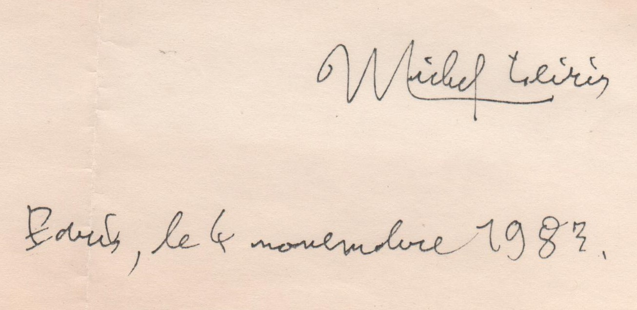 signature de l'écrivain français Michel Leiris sur une correspondance (collection personnelle)